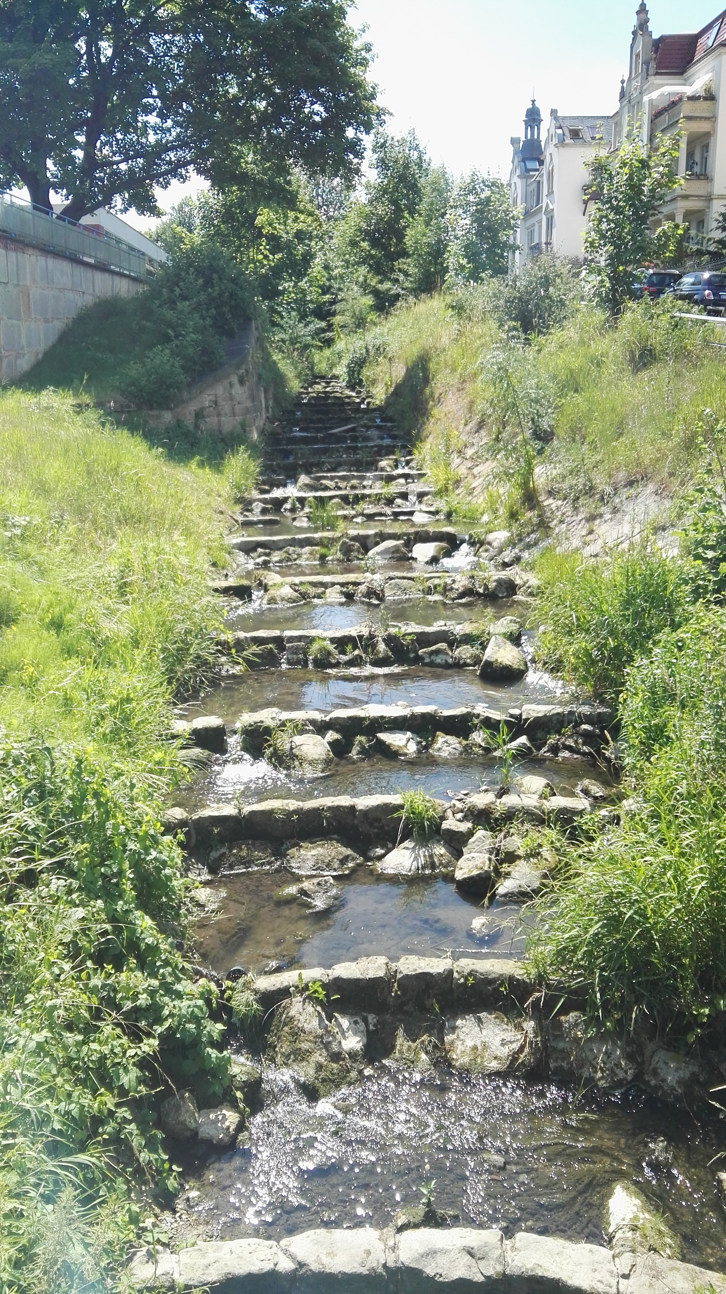 Landgraben in Dresden, kurz vor der Mündung